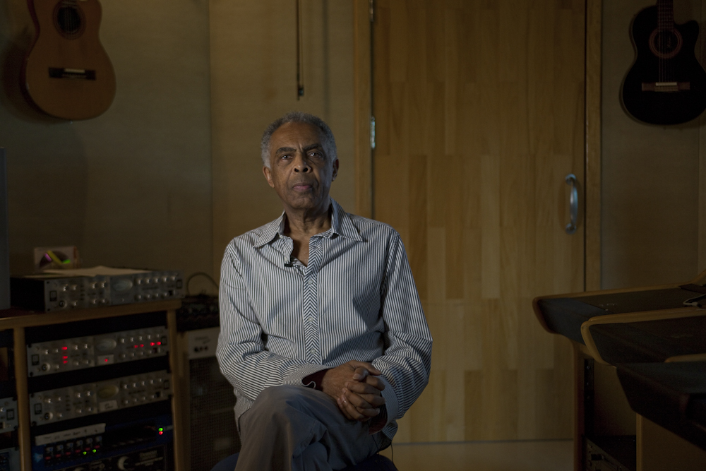 Foto tirada em 26/08/2010 pelo Garapa - Coletivo Multimídia ( Gilberto Gil em entrevista ao projeto Produção Cultural no Brasil: Gilberto Gil foi ministro da Cultura (2003-2008).